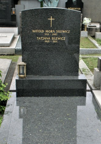 Witold Silewicz-Friedhof Döbling